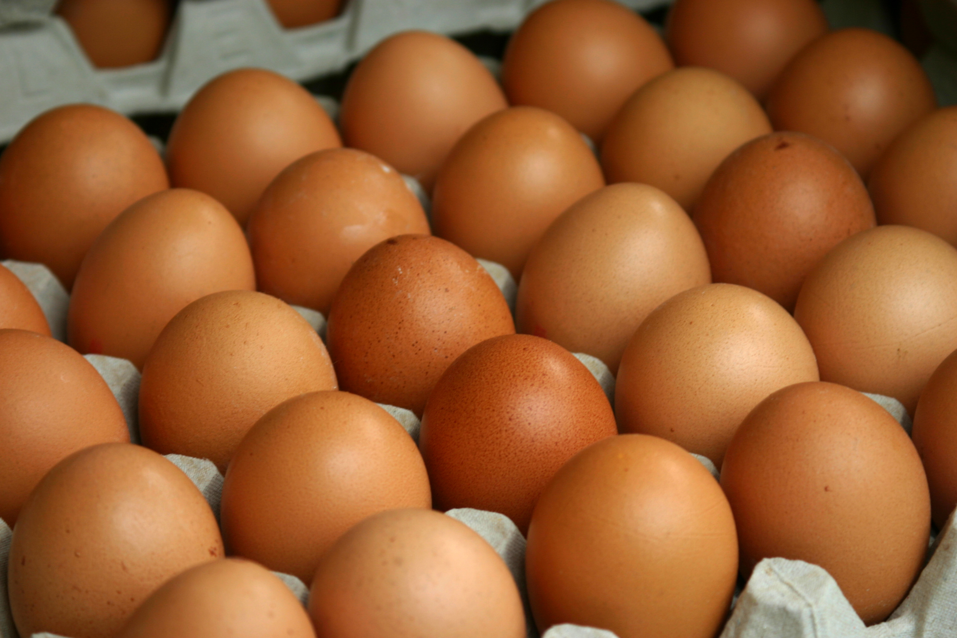 Palette mit Hühnereiern auf dem Wochenmarkt